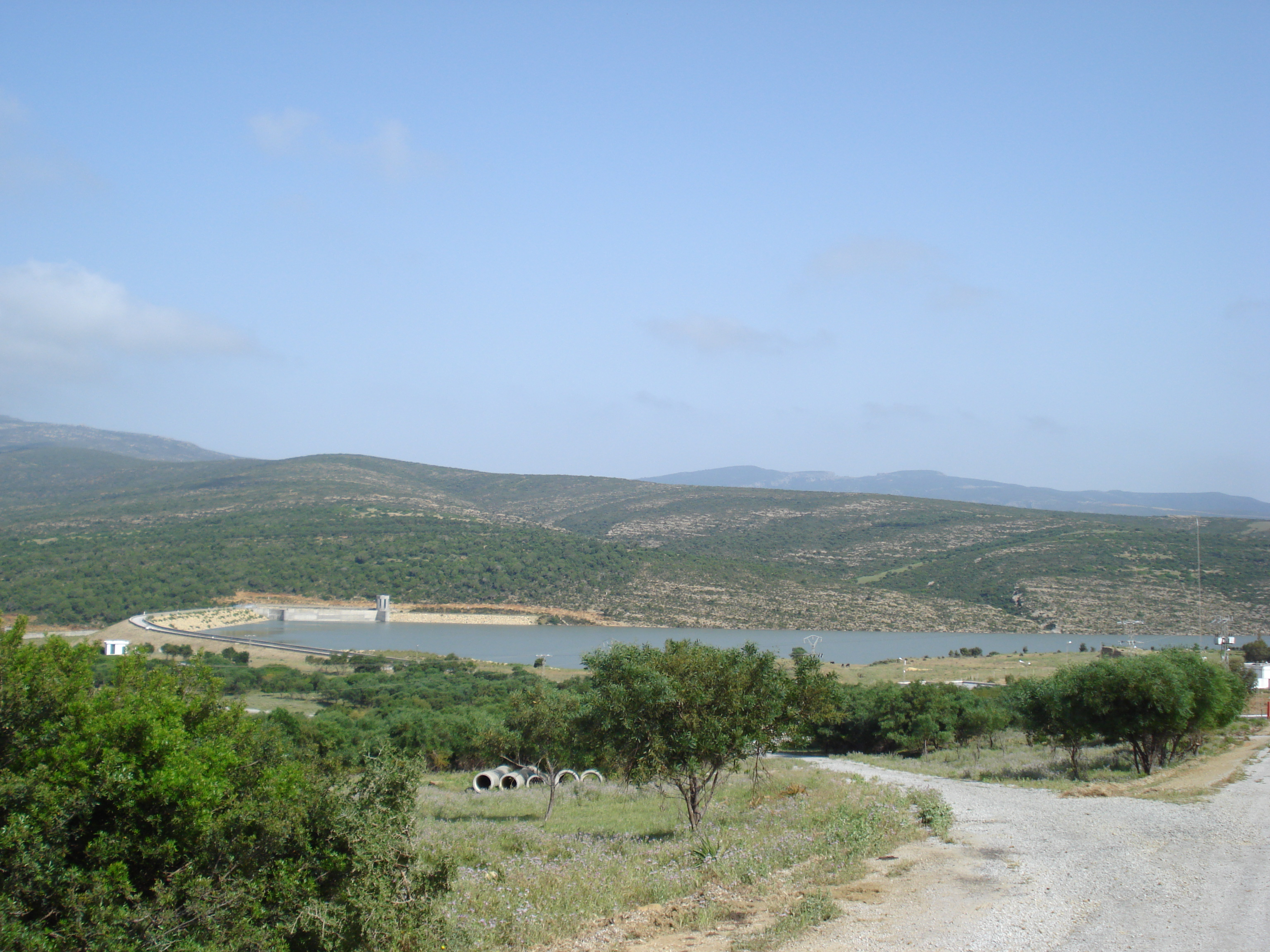 Barrage Oued El Abid, Gouvernerat de Nabeul, Tunisie